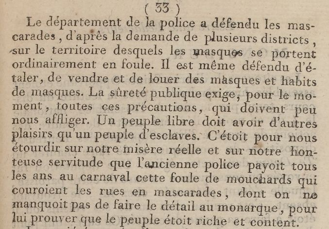 Annonce de l'interdiction du Carnaval de Paris en 1790. Avec des explications sensées justifier celle-ci.